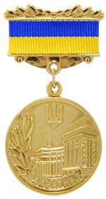 Знак награждённого Почётной грамотой Кабинета Министров Украины